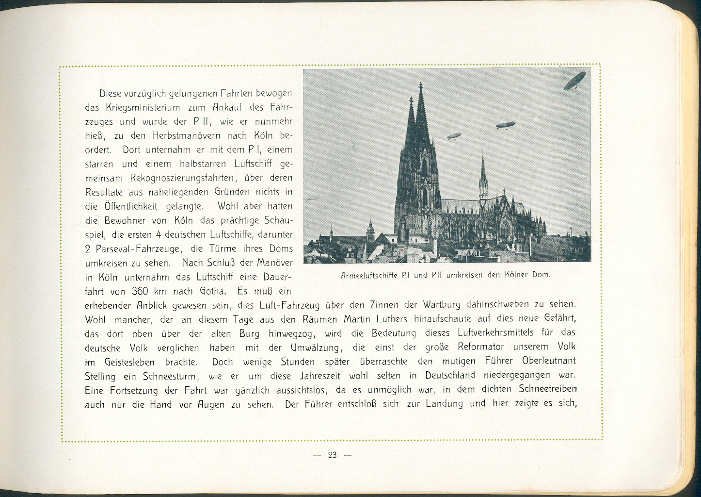 Die ersten 4 deutschen Luftschiffe über Koeln